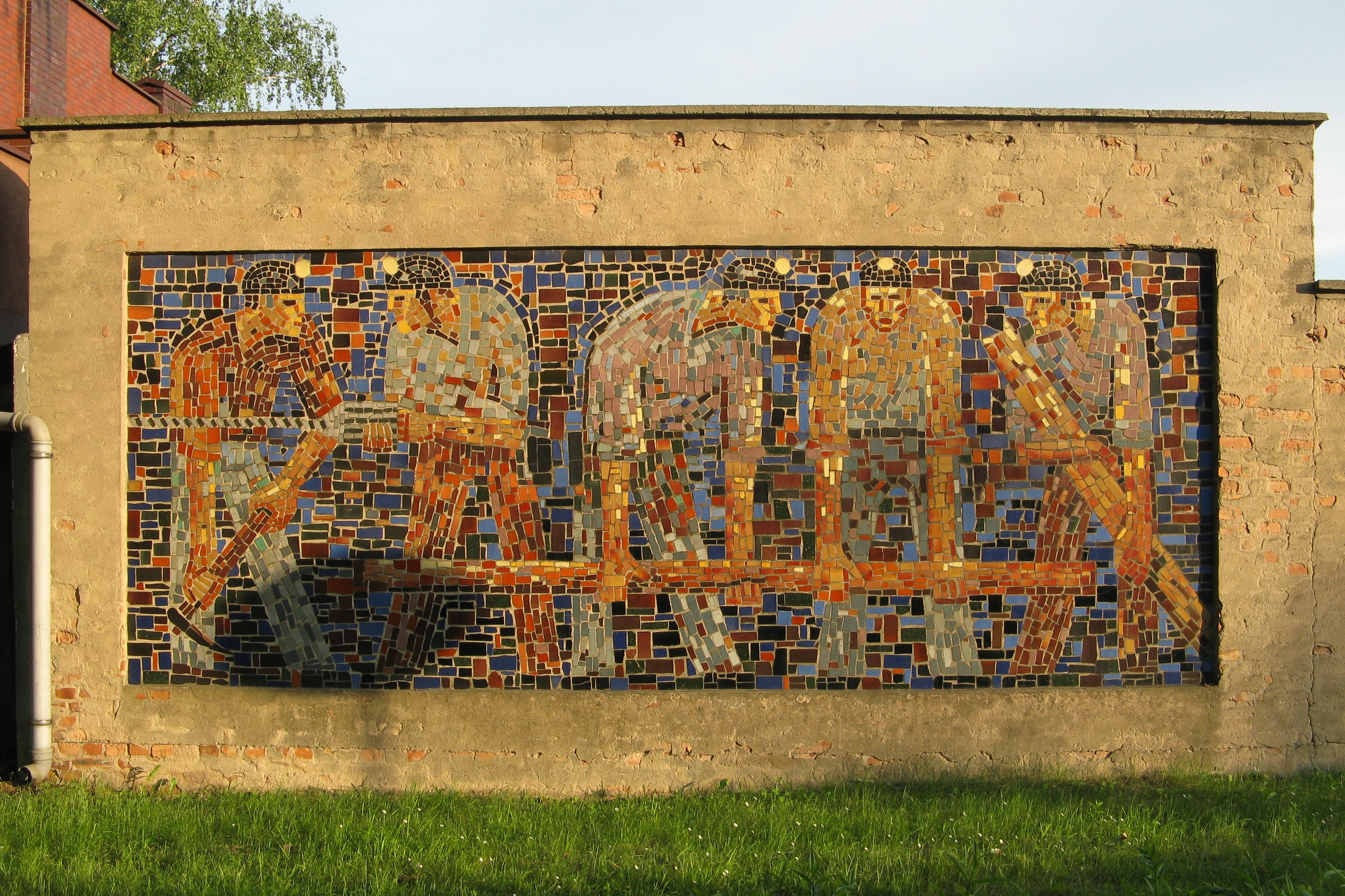 mozaika przedstawiająca pracujących górników na murze w Siemianowicach Ślaskich (Michałkowice) przy ul. Elizy Orzeszkowej, autor: Stanisław Barnaś (1935-1986) „w latach 1966-1974 zatrudniony był jako plastyk zakładowy kopalni „Michał”. W tym czasie powstała mozaika.” (